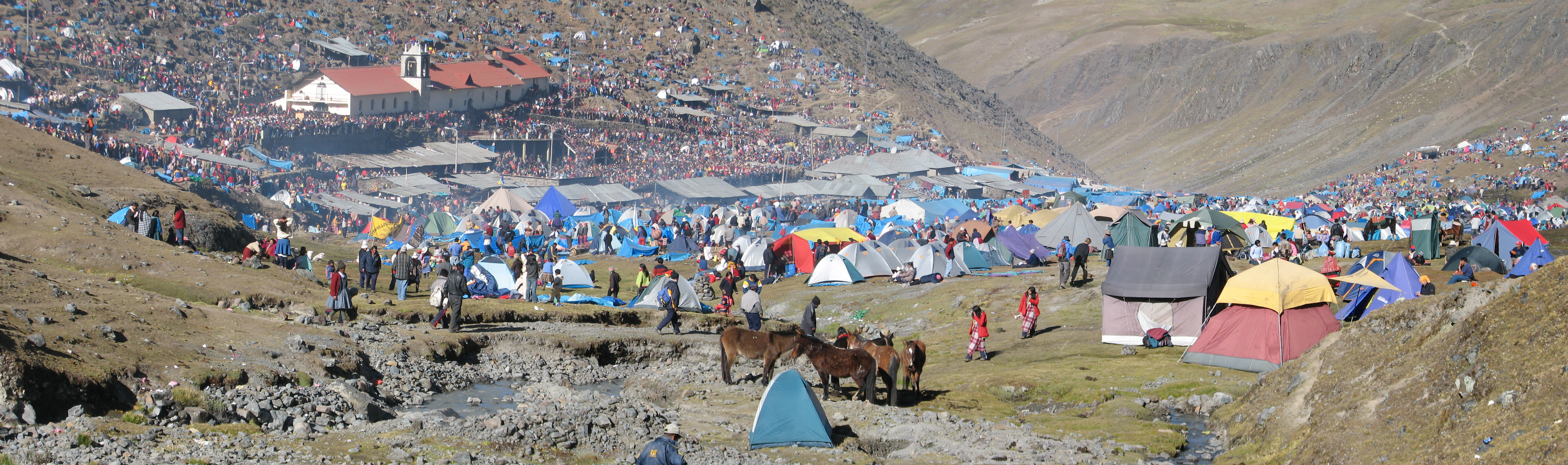 Qoyllur_Rit'i: Festival señor de Qoyllur Rit'i, panoramic overview